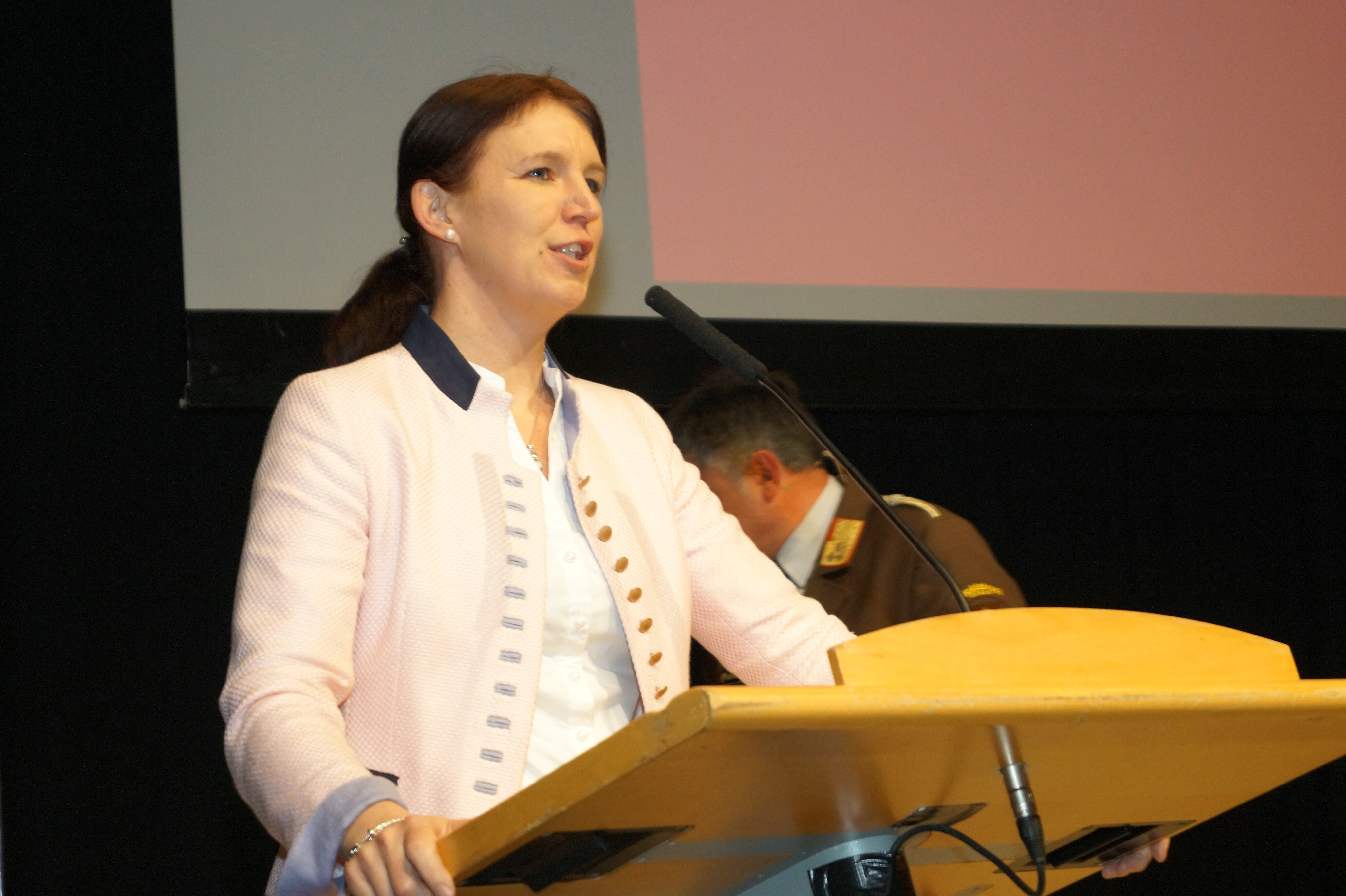 LAbg. Michaela Langer-Weninger